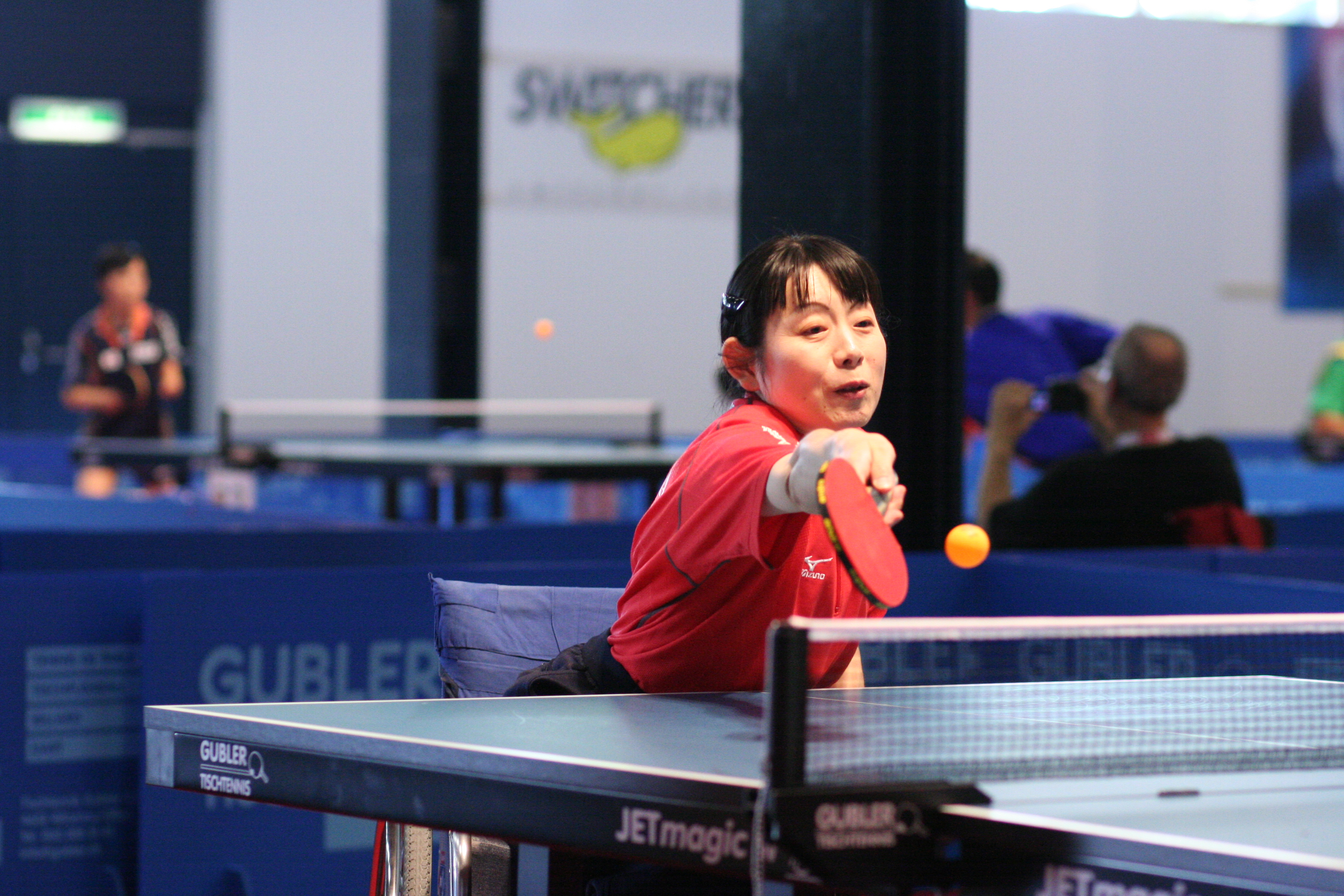 Satoko Fujiwara (Japan)